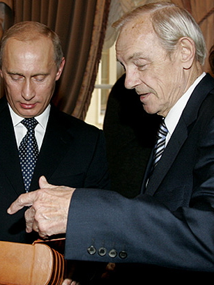 САНКТ-ПЕТЕРБУРГ, КОНСТАНТИНОВСКИЙ ДВОРЕЦ. С народным артистом СССР Кириллом Лавровым.